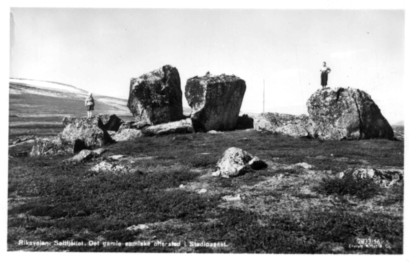 Offersteiner i Stødiepasset et gammelt samisk offersted. Seidesteiner. Riksvei 50, Saltfjellet. Nordland.